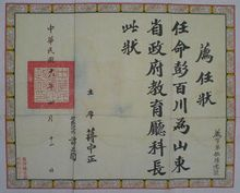 1929年中华民国国民政府荐任状，国民政府主席蒋中正与行政院院长谭延闿任命彭百川为山东省政府教育厅科长（当时无处长）。